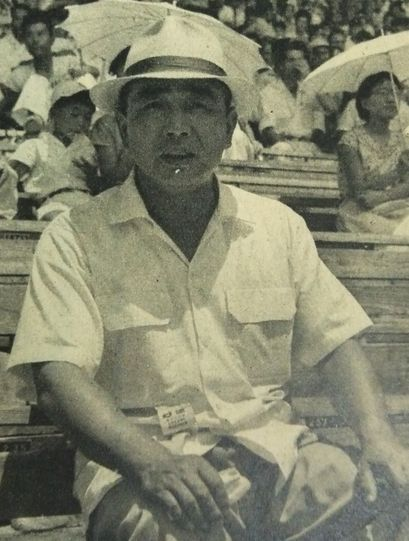 藤田省三